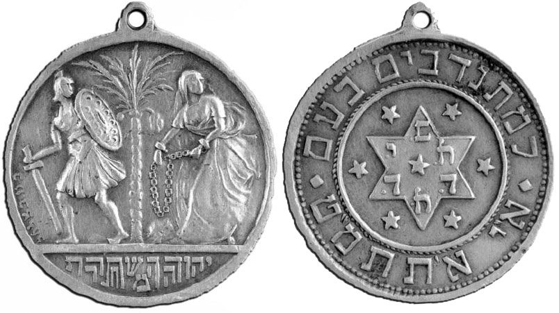 מדליית יהודה המשתחררת